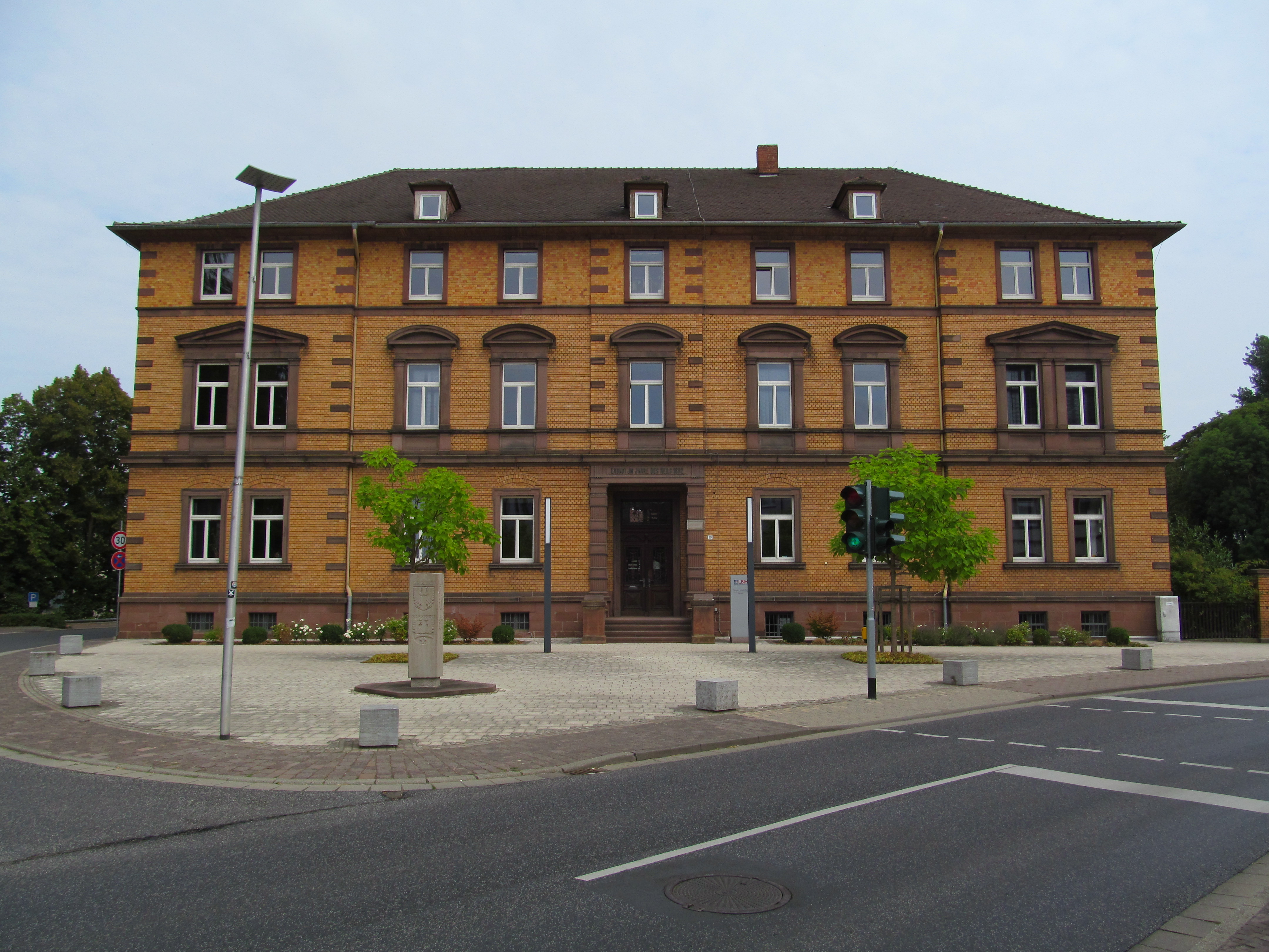 das Haus Landgraf-Philipp-Straße 19 in Ziegenhain